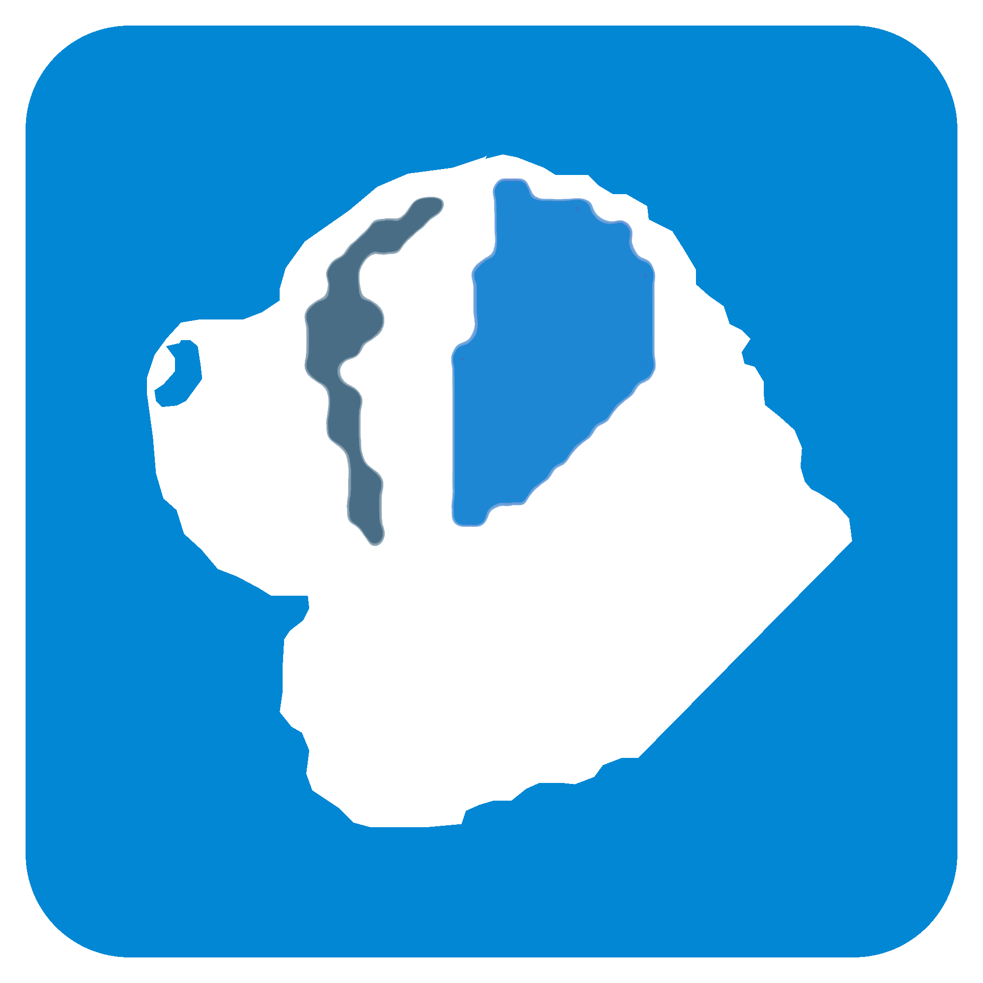 Símbolo utilizado para identificar a la estación San Bernardo en 2001.